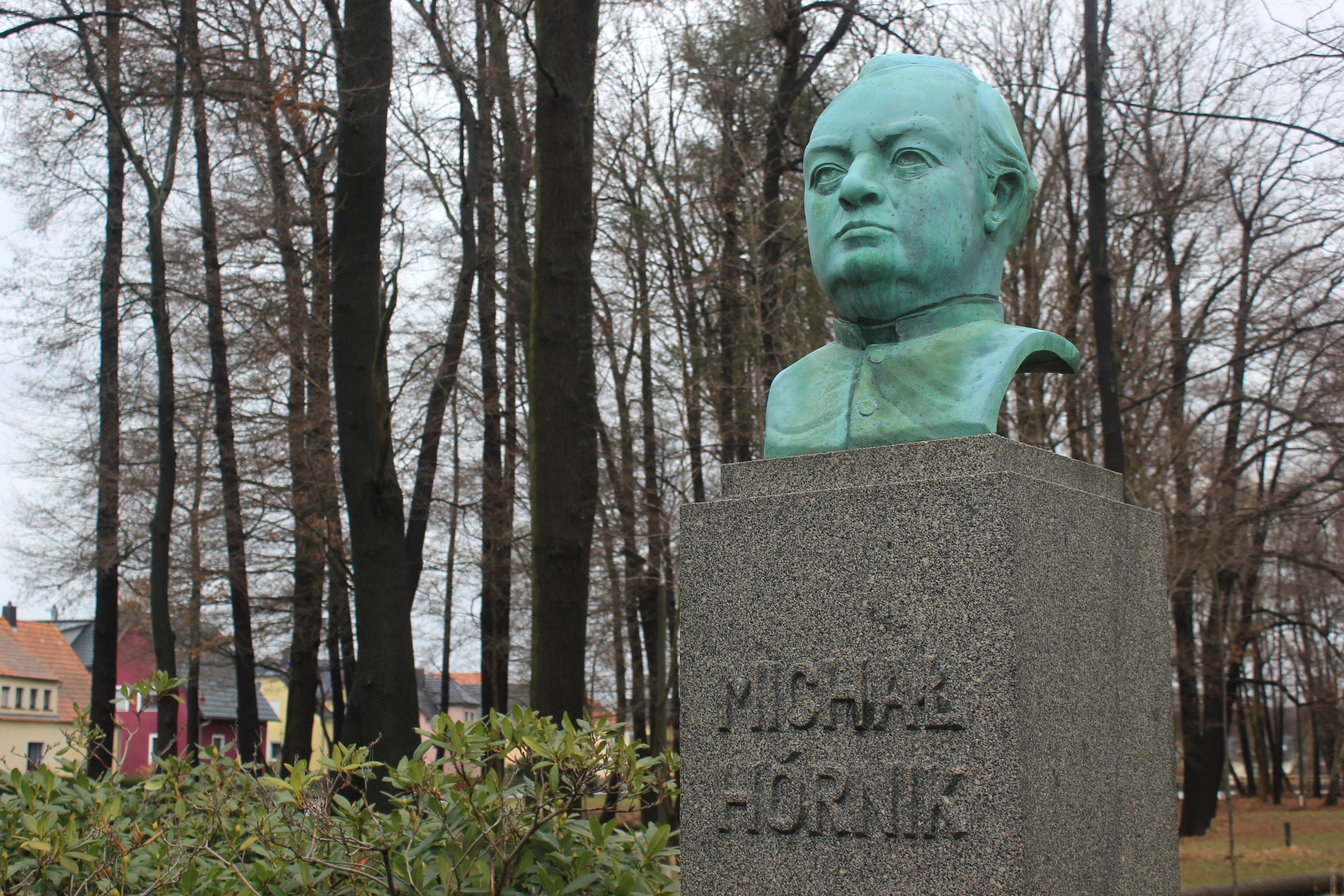 Hornjoserbsce: Połpostawa Michała Hórnika we Worklecach.